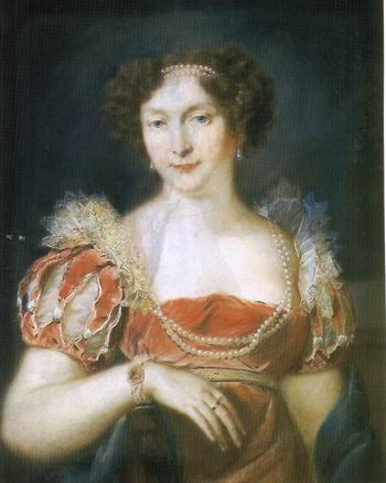 Мария Вюртембергская, герцогиня Саксен-Кобург-Готская (1799-1860)